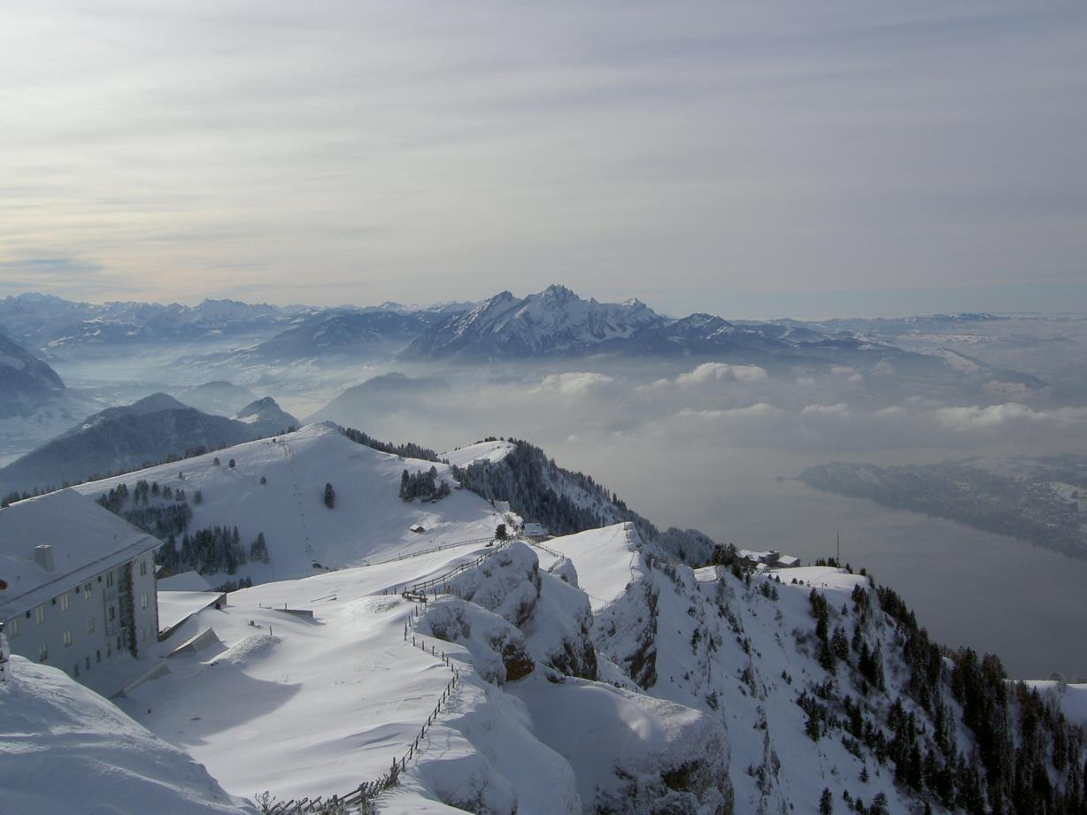 Blick von der Rigi auf den nahegelegenen Pilatus.